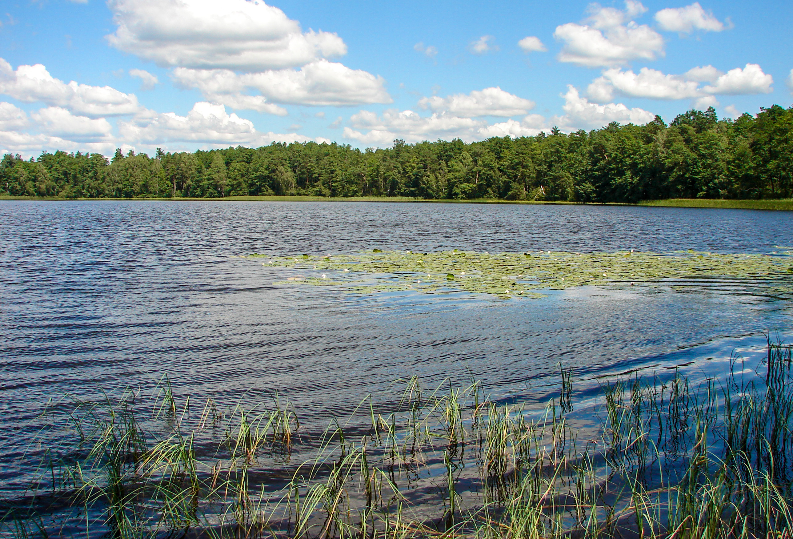 Озеро «Стрільське», Сарненський район Карпилівське л-во: кв. 17, 18, 27, 28